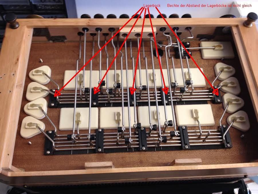 Mechanik einer Kaiser